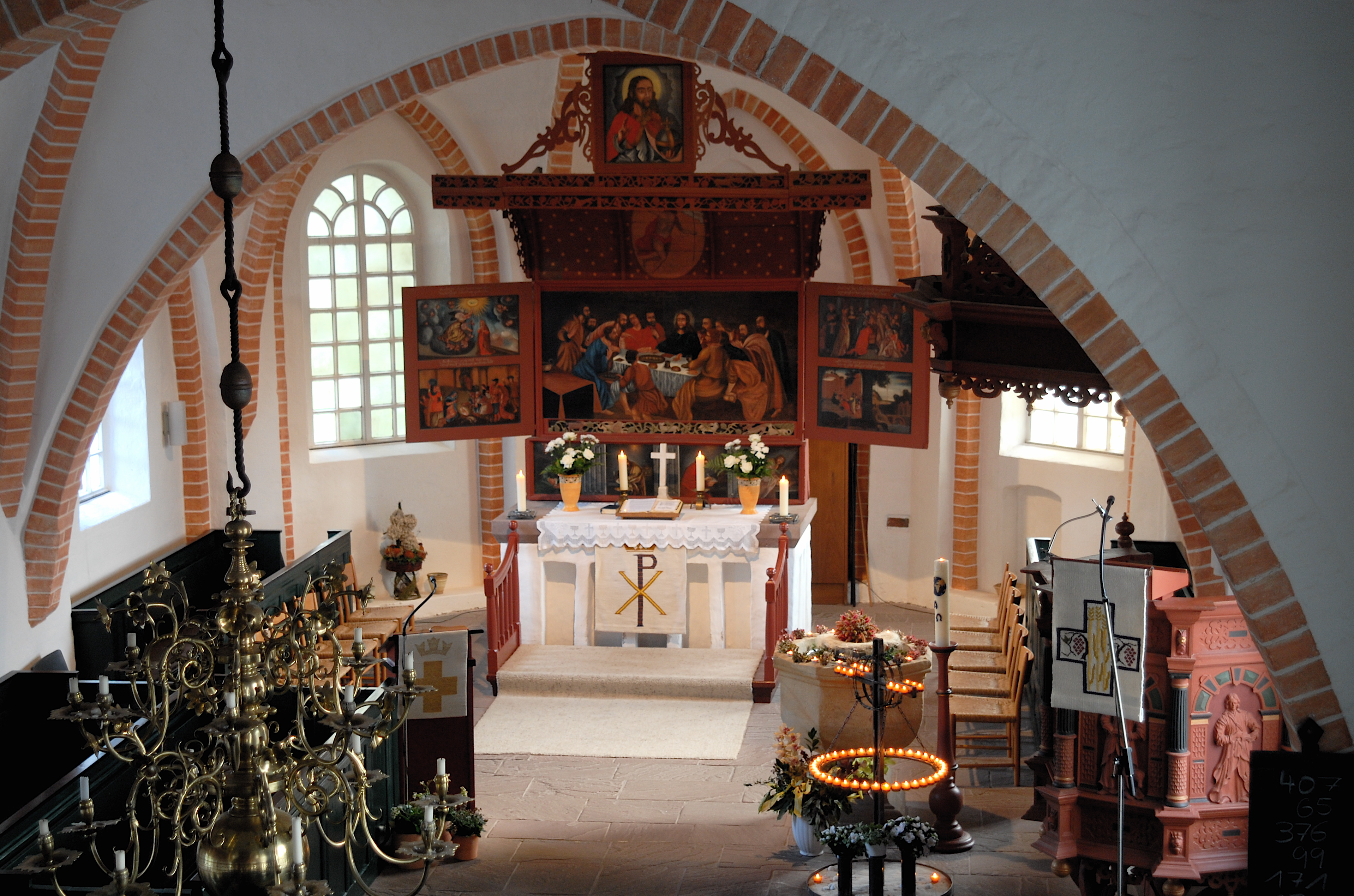 Chor mit Altar in Völlen, Ostfriesland, Niedersachsen, Deutschland